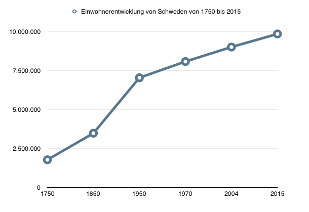 Einwohnerentwicklung von Schweden